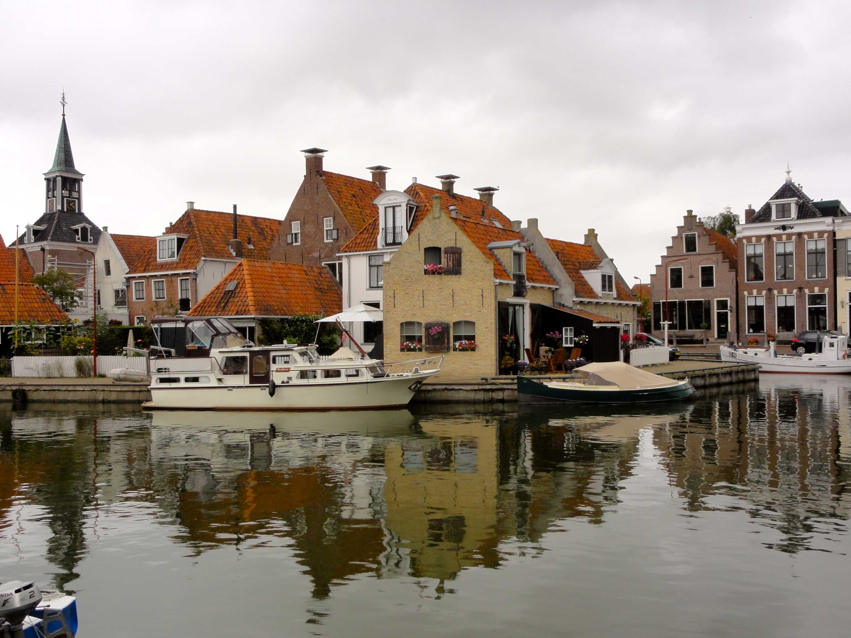 Zicht op de Turfmarkt, de Pruikmakershoek en de Waag vanaf het Vallaat te Makkum